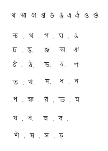 митилакшара майтхили